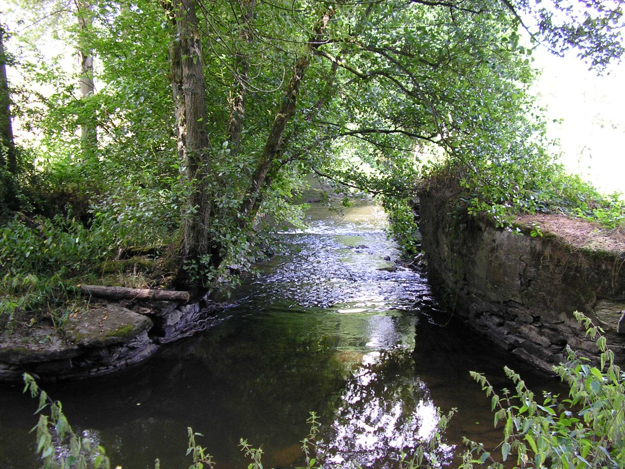 Bewässerungswehr "A Wanaal", Kiischpelt, Luxemburg